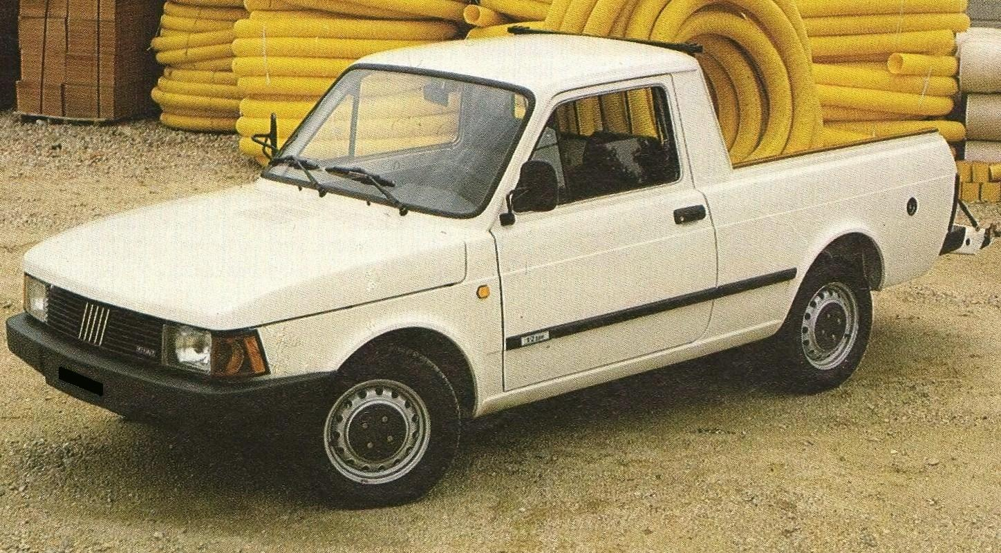 El Fiat Fiorino 1985 pickups